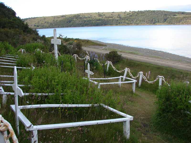 El 12 de agosto de 1828 el comandante del HMS Beagle Pringles Stokes falleció luego de haberse disparado un tiro en su camarote doce días antes con el propósito de suicidarse.